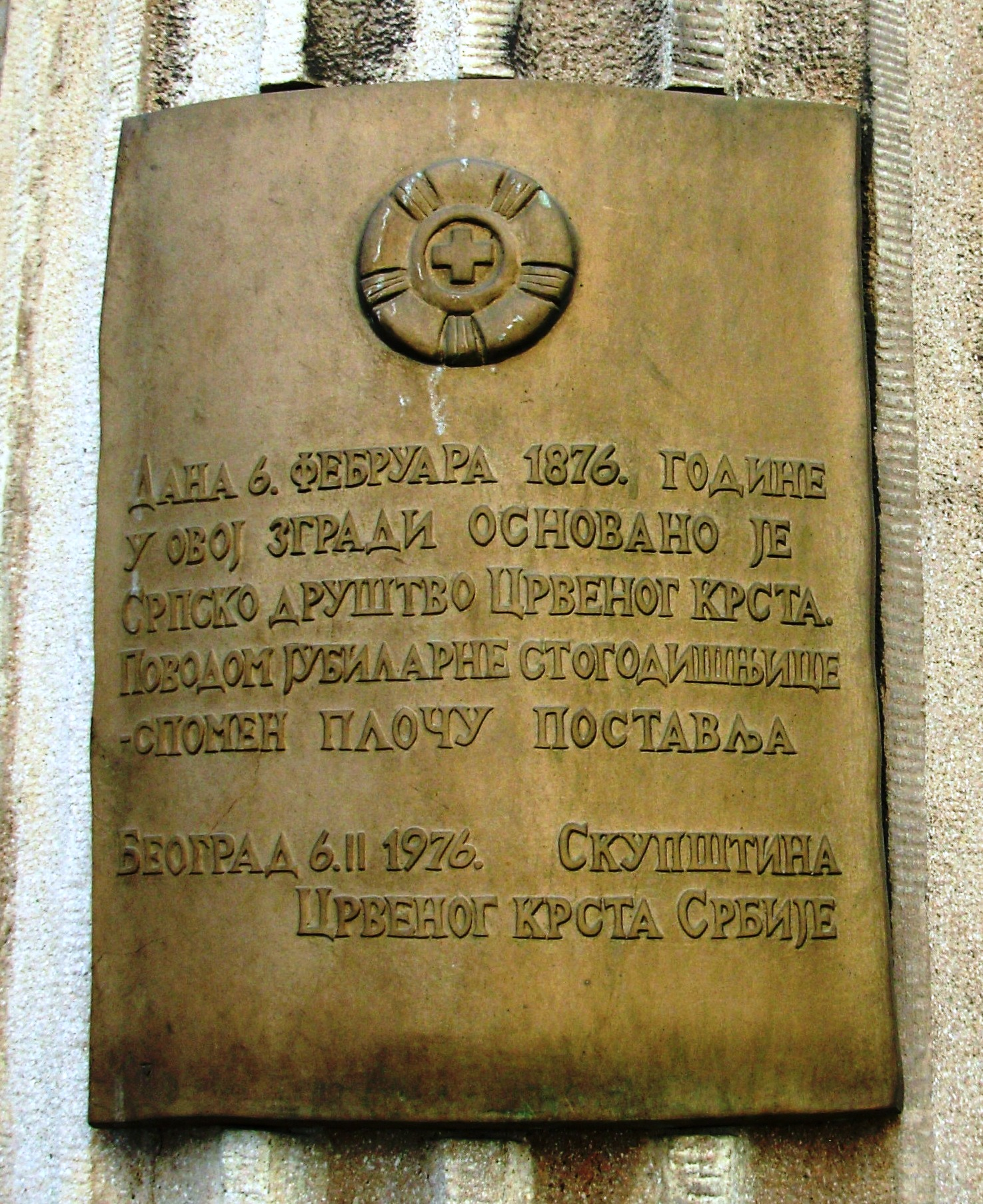 Табла на згради нове Кинотеке. Васина улица, Београд. Сликао Голдфингер